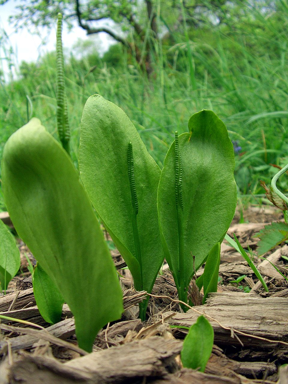 Ophioglossum vulgatum - plants